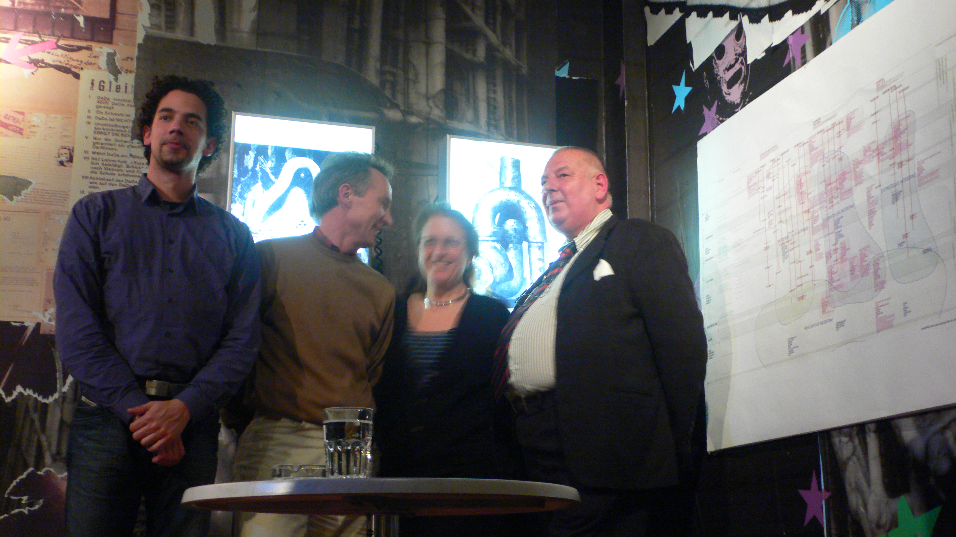 Präsentation der Nr. 1 im Jahre 7, Adrian Notz, Cabaret Voltaire, und Seine Majestät König Kraska, Herrscher über das Zen- und A-Zentrische Weltreich.